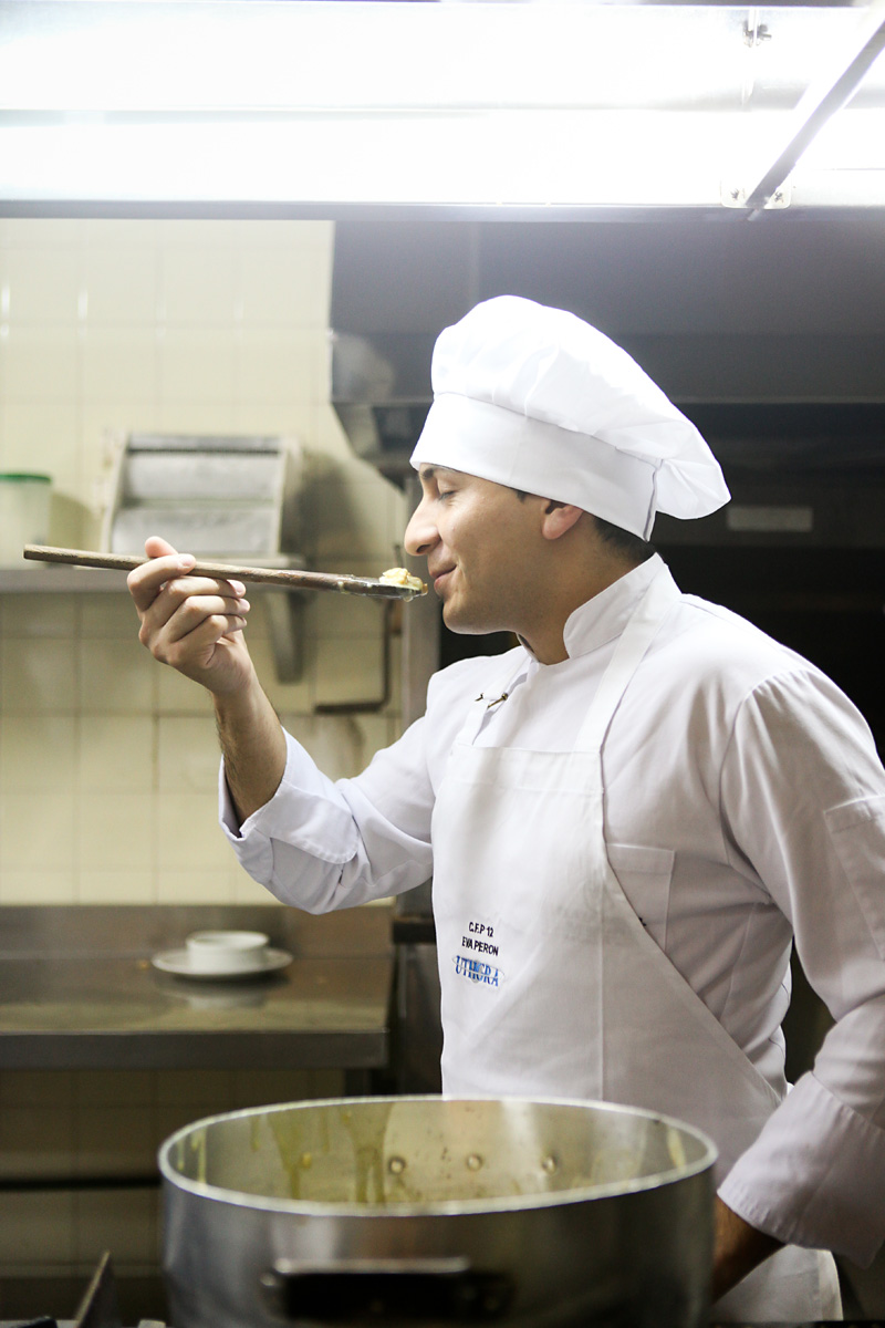 Foto:Estrella Herrera